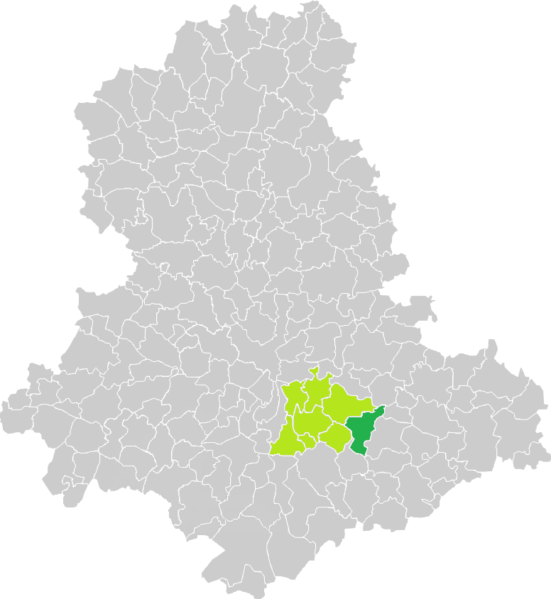 Carte de situation de la commune de Saint-Bonnet-Briance (en vert foncé) dans le votre Canton (en vert clair) sur une carte des communes de la Haute-Vienne